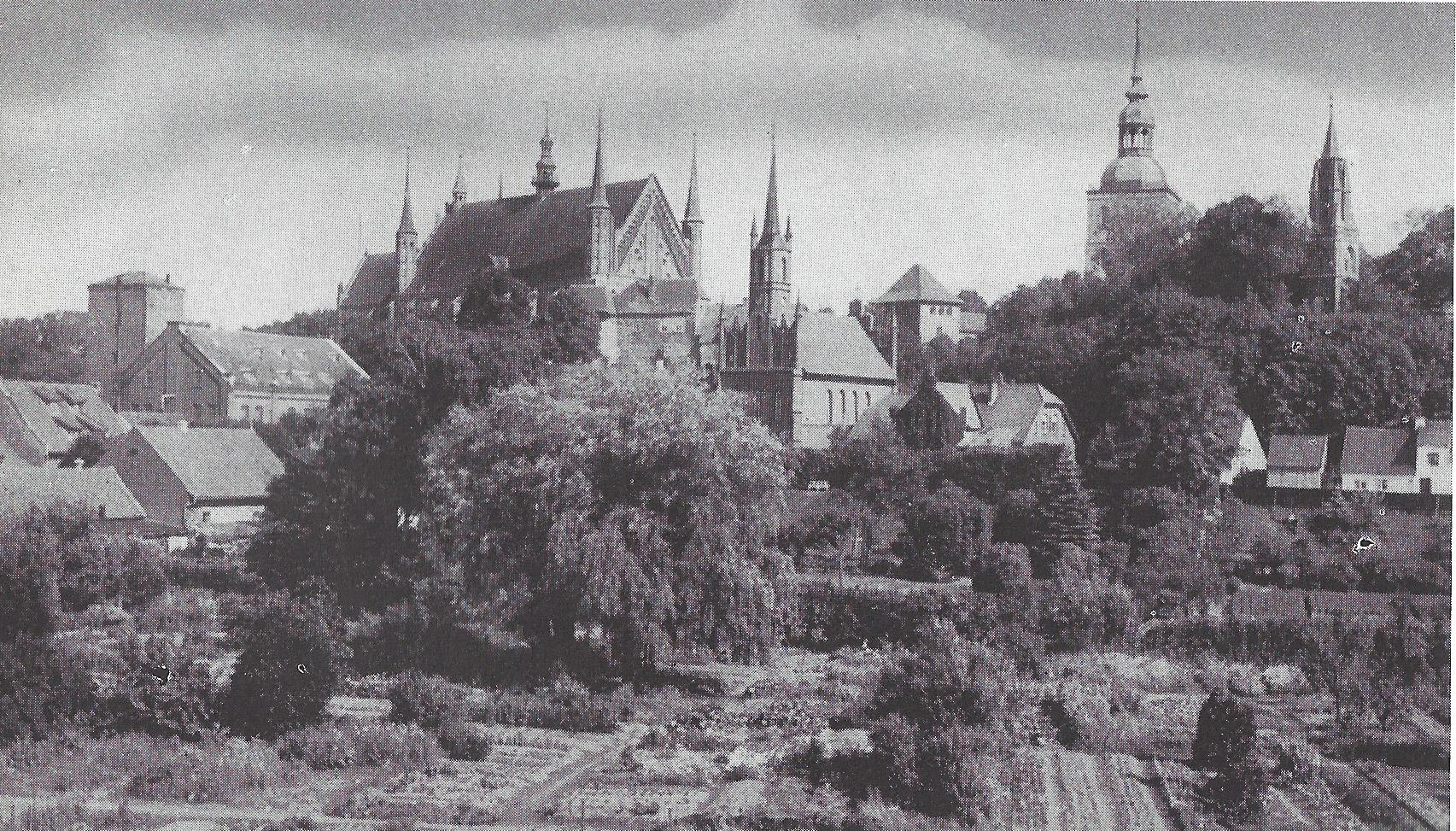 Domberg in Frauenburg.